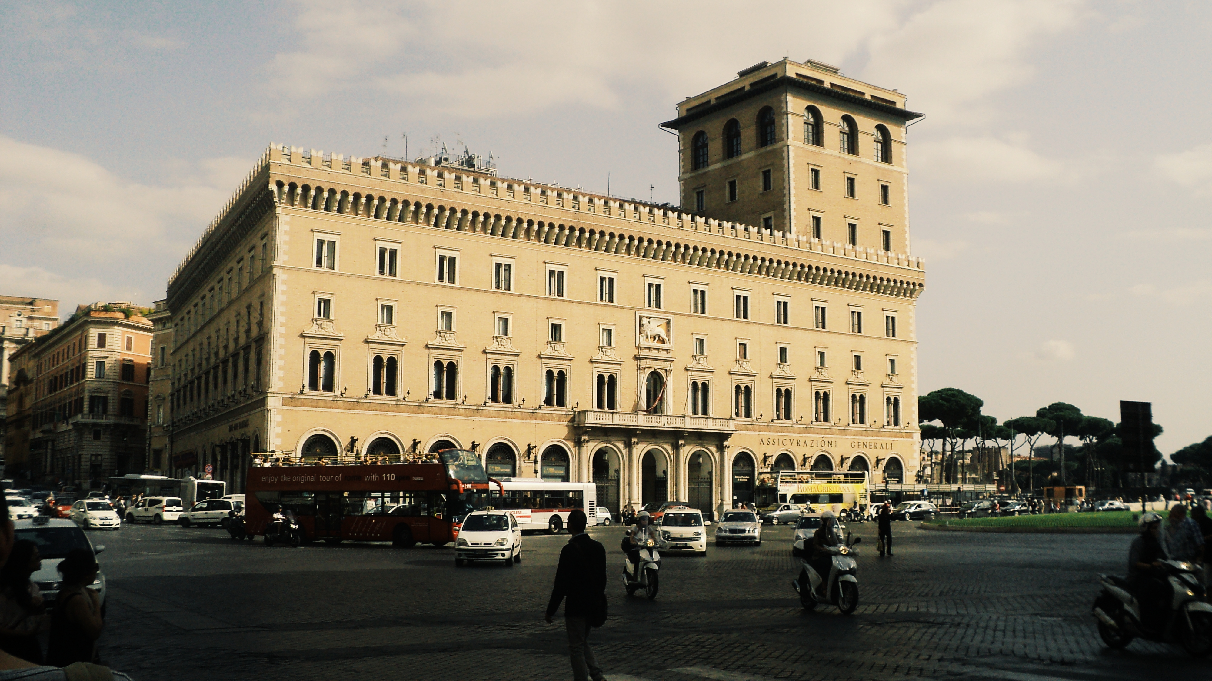 Le palais des assurances Generali, Place de Venise, Rome